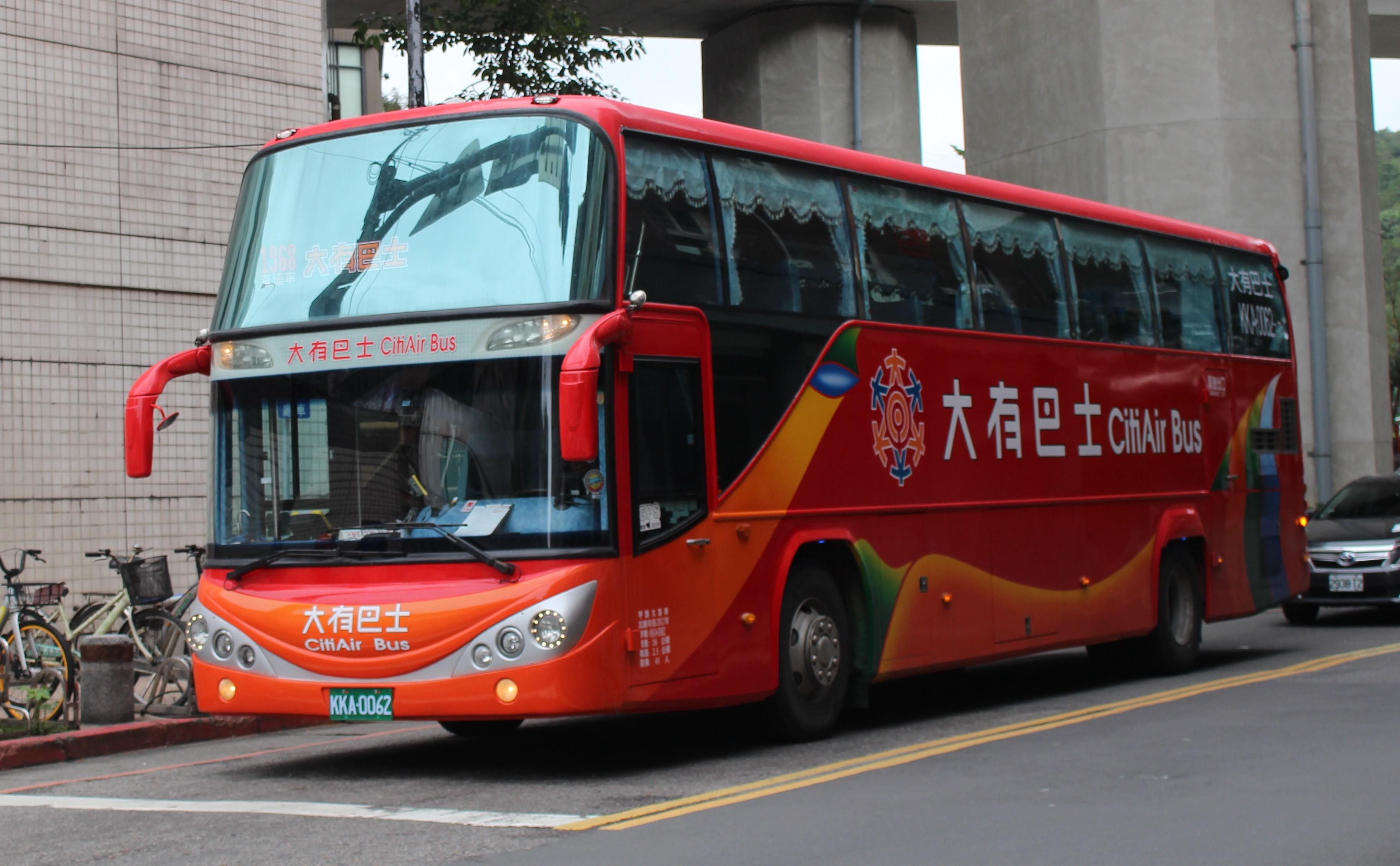 大有巴士KKA-0062 1968